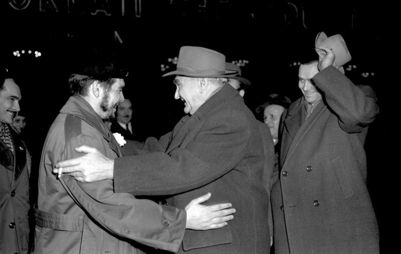 Zenralbild/Sturm 18.12.60 Kubanische Delegation verabschiedet Am Sonnabend, dem 17.12.60, wurde die kubanische Wirtschaftsdelegation unter der Leitung des Präsidenten der Nationalbank der Republik Kuba, Dr. Ernesto Guevara, auf dem Flugplatz Schönefeld vom Stellvertreter des Vorsitzenden des Ministerrates und Minister für Außenhandel und Innerdeutschen Handel, H. Rau herzlich verabschiedet.